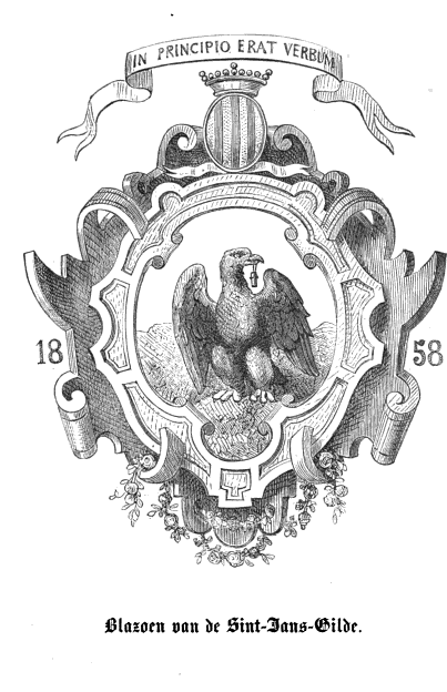 G. J. J. van Melckebeke, Geschiedkundige aenteekeningen rakende de Sint-Jans-Gilde, bygenaemd De Peoene, onder zinspreuk: In principio erat verbum, H. Dierickx-Beke, Malines, 1862